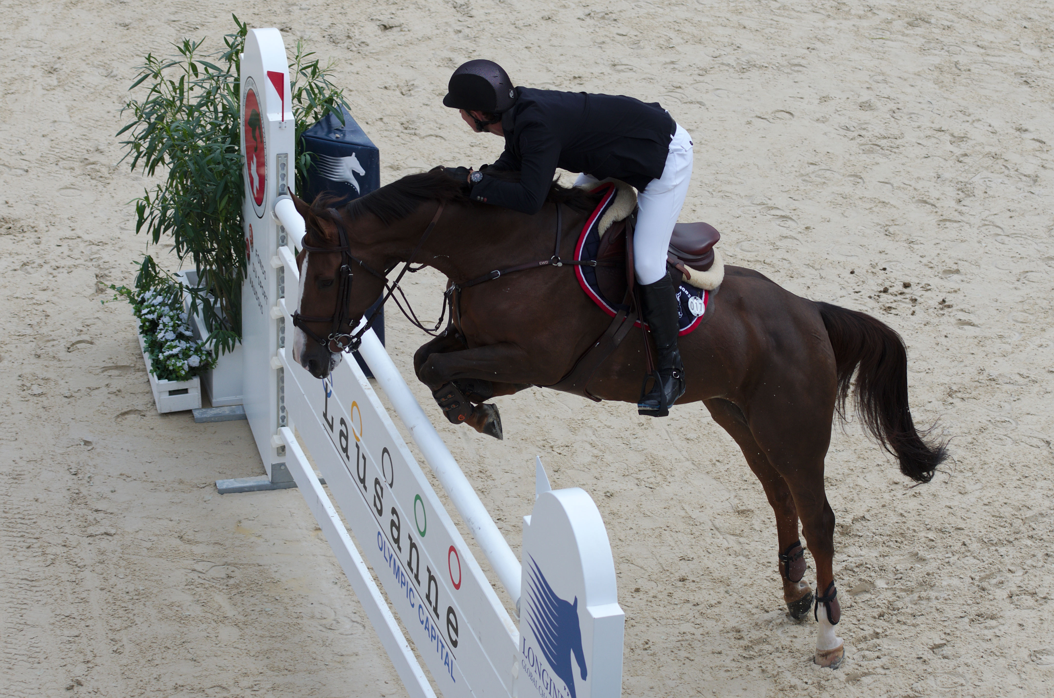 2013 Longines Global Champions - Lausanne - 14-09-2013 - Jos Verlooy et Farfelu de la Pomme